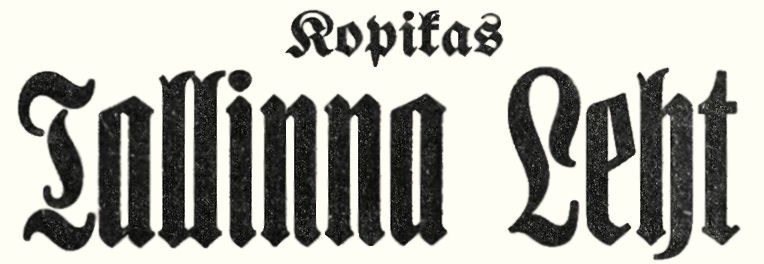 Kopikas Tallinna Leht, päismik